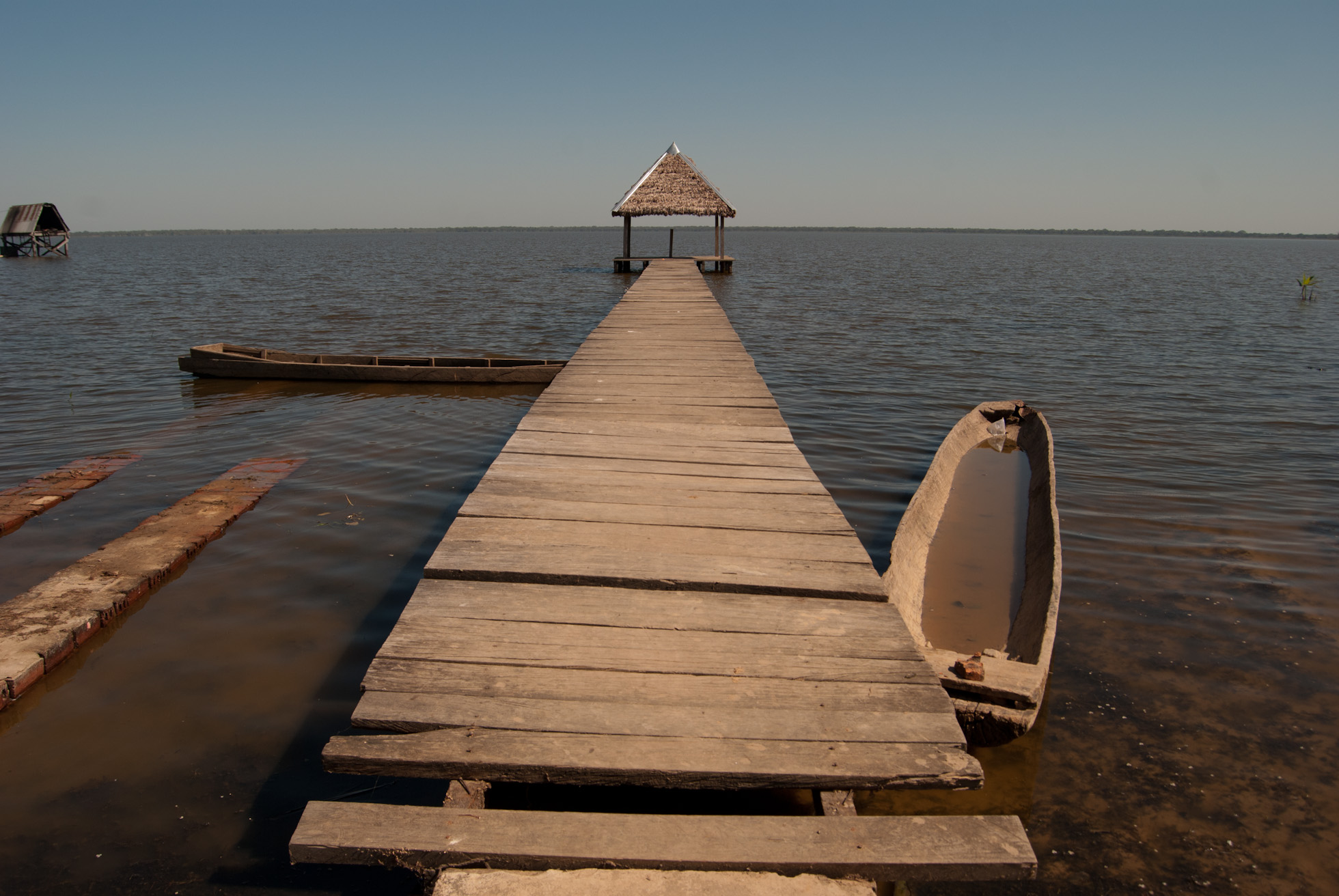 Esta foto se tomó el 5 de julio, 2011 en El Beni, Bolivia, con una Nikon D80.